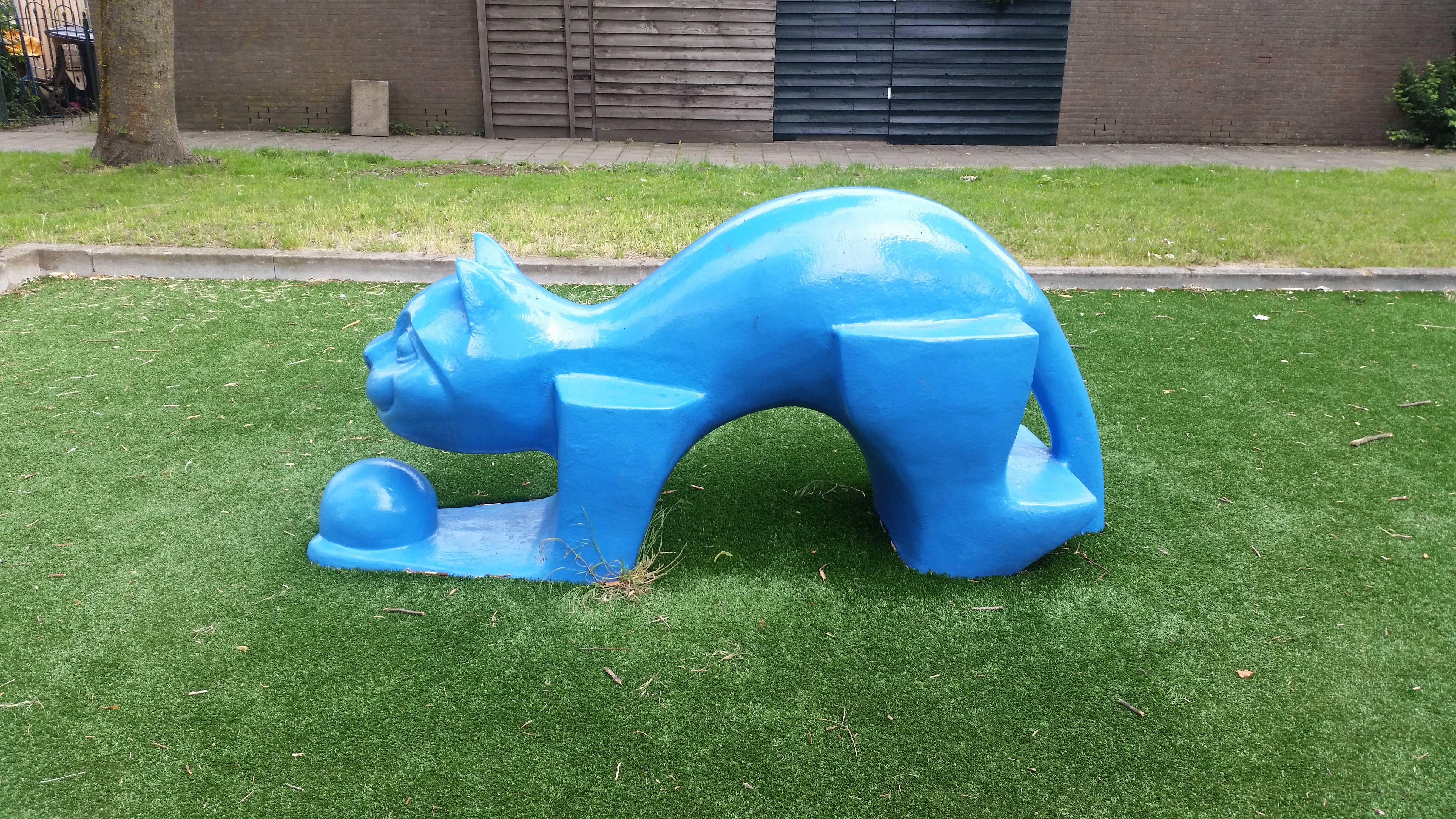 Jan Nautahof, Amsterdam ZO